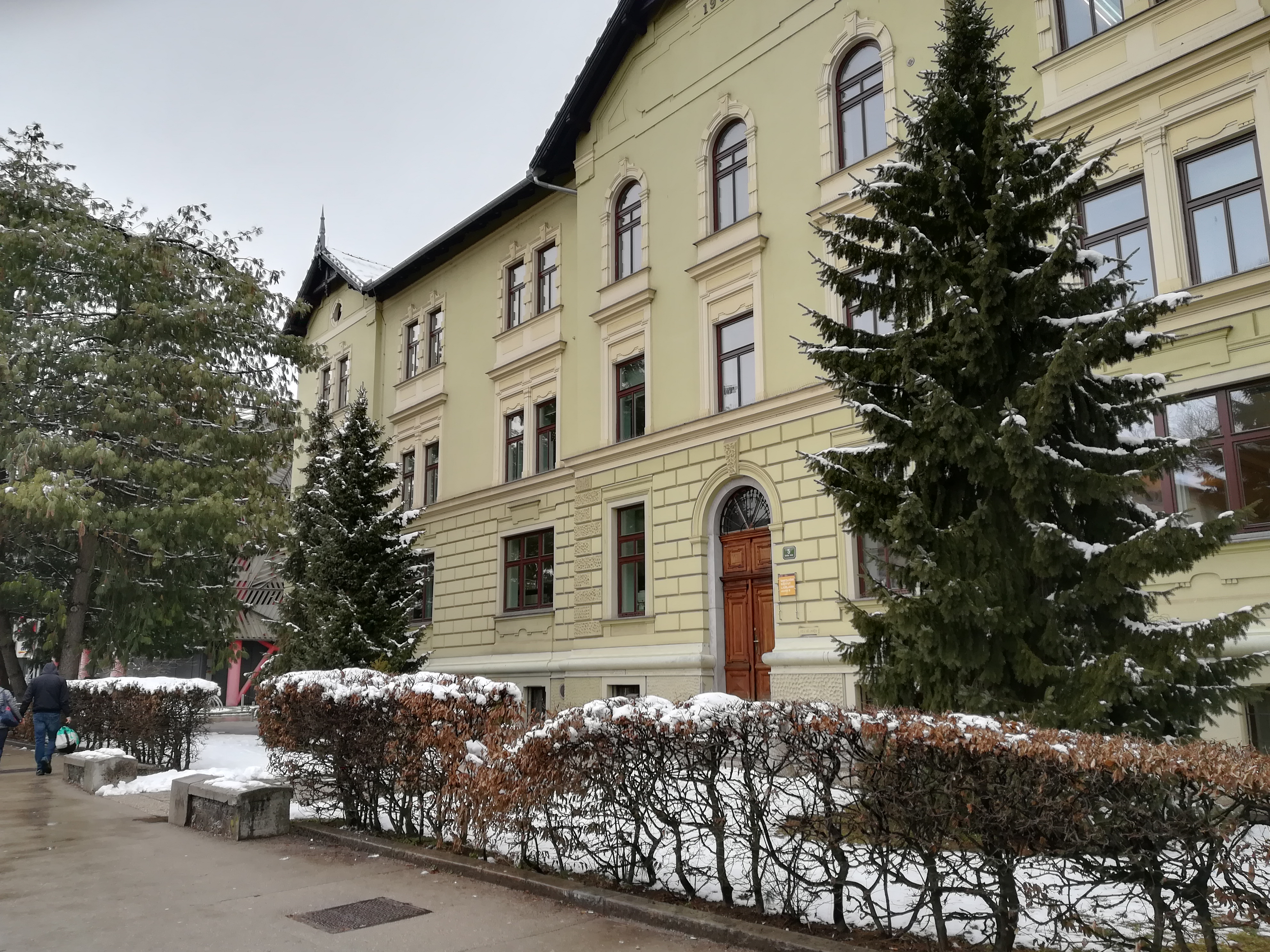 Strokovna knjižnica, Onkološki inštitut Ljubljana